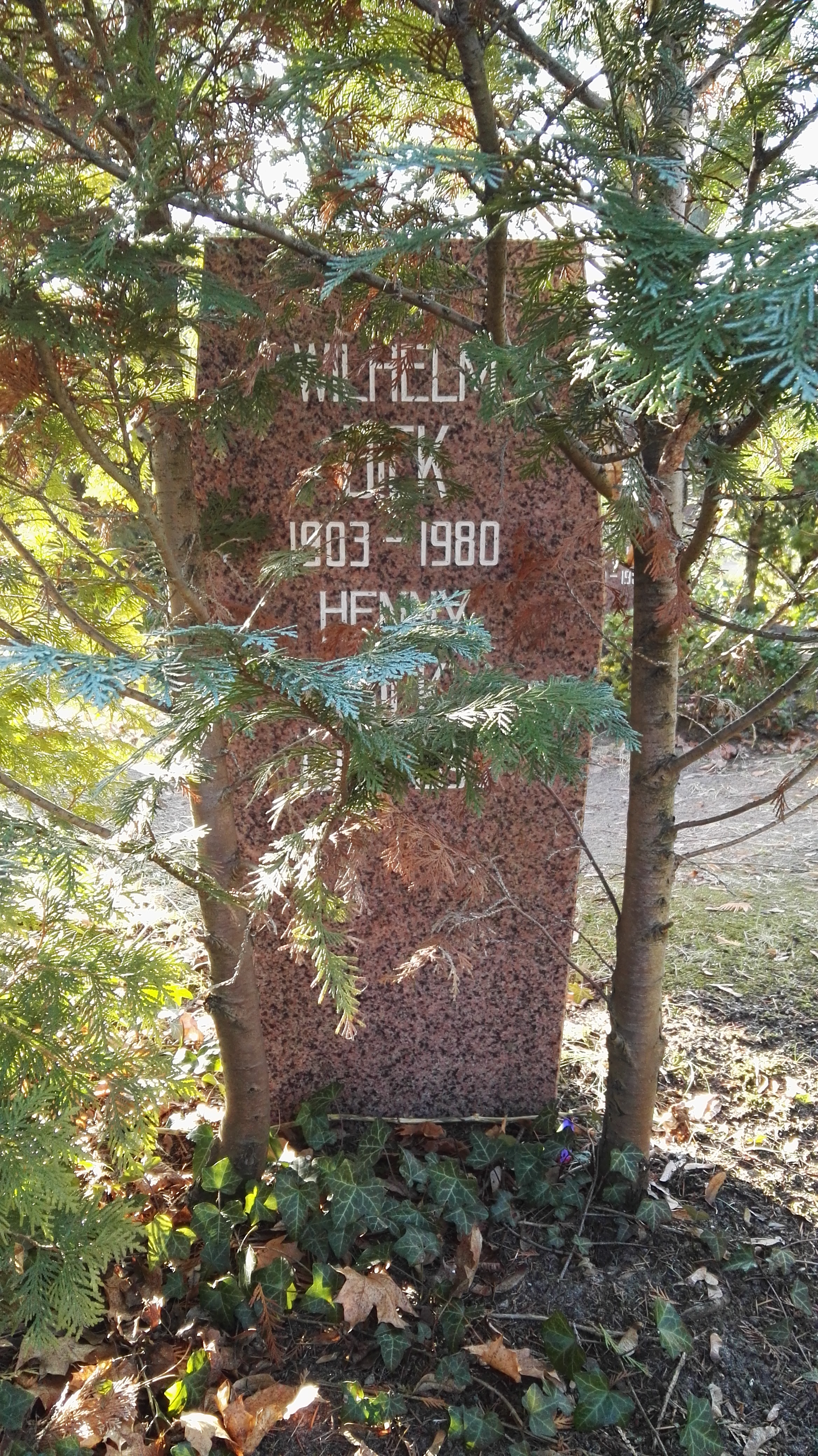 Grab von Wilhelm Bick und Henny Bick in der Grabanlage Pergolenweg auf dem Sozialistenfriedhof des Zentralfriedhofs Friedrichsfelde